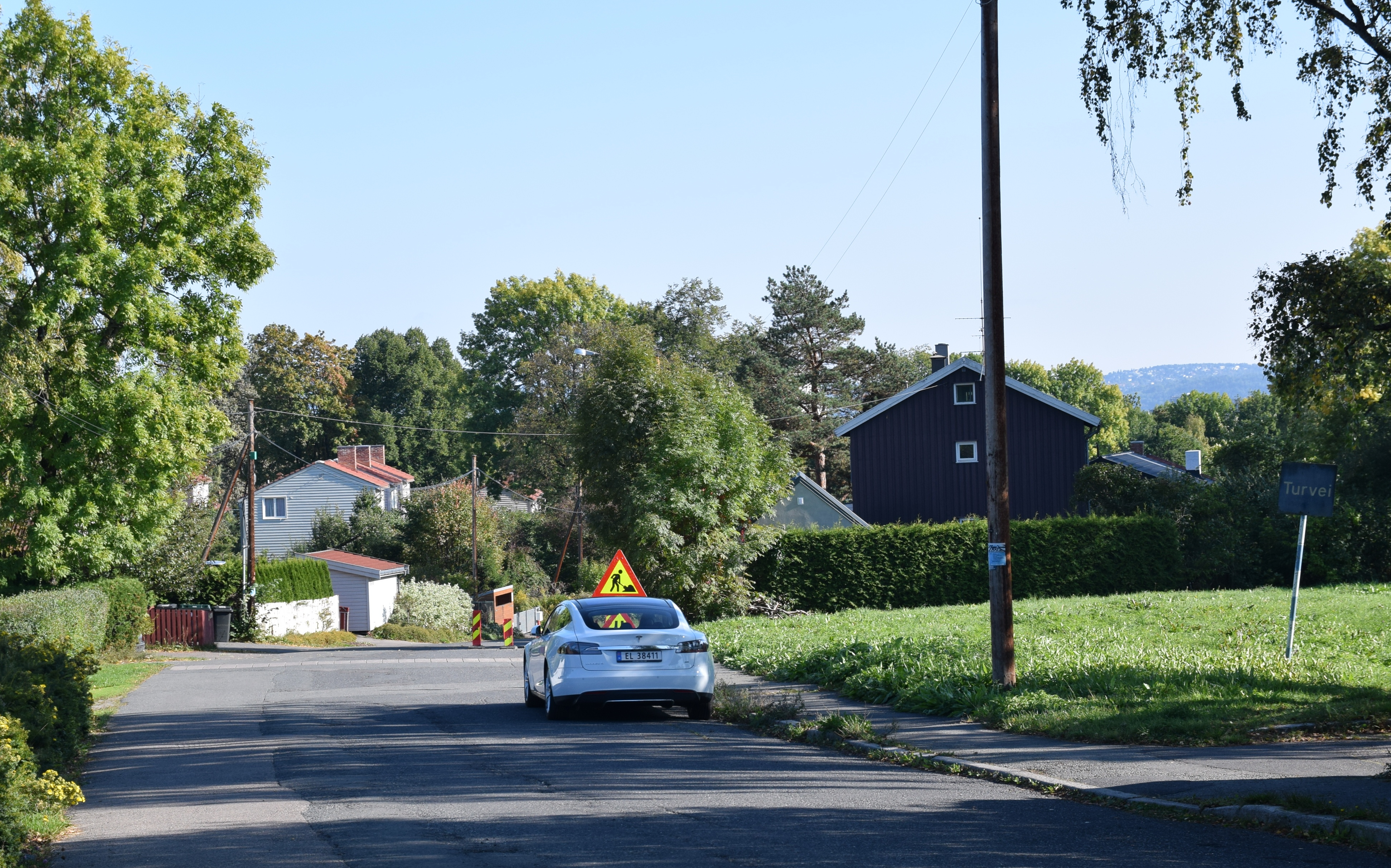 Gråbrødreveien, Ullern, Oslo, sett mot sydvest med inngangen til Turvei A4 til høyre